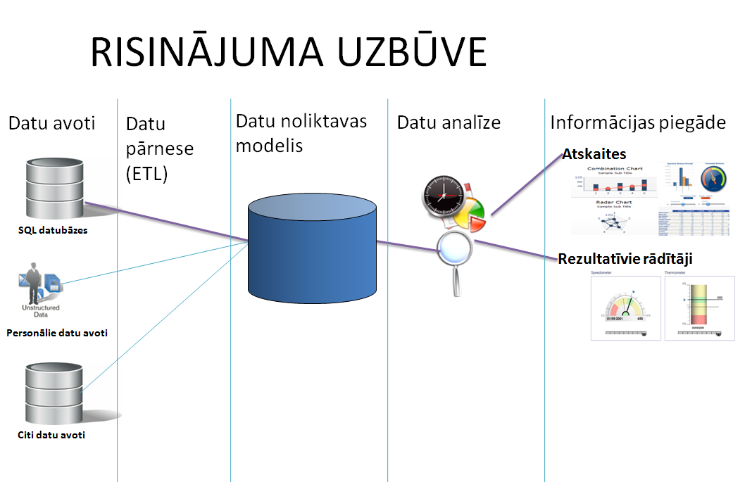 Attēlā izmantots fragments no 2009. gada 14. maijā notikušā biznesa inteliģences risinājumiem veltītā semināra prezentācijas materiāliem.